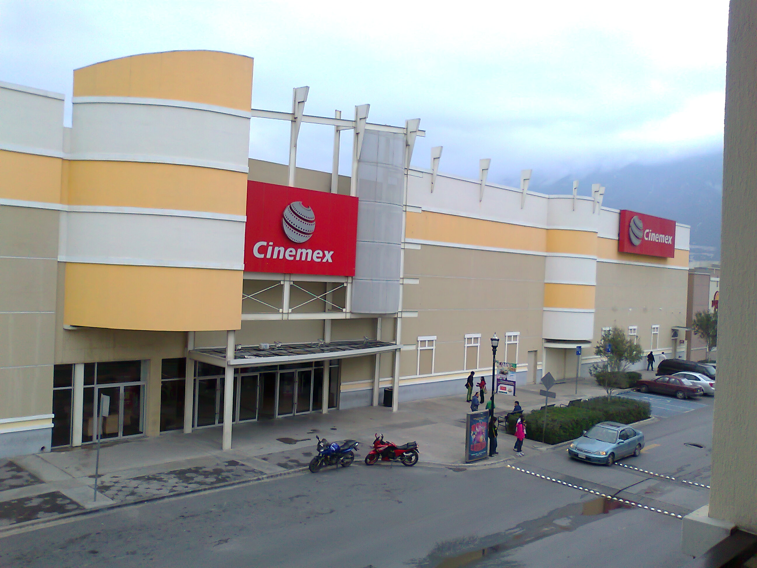 Cinemex Santa Catarina